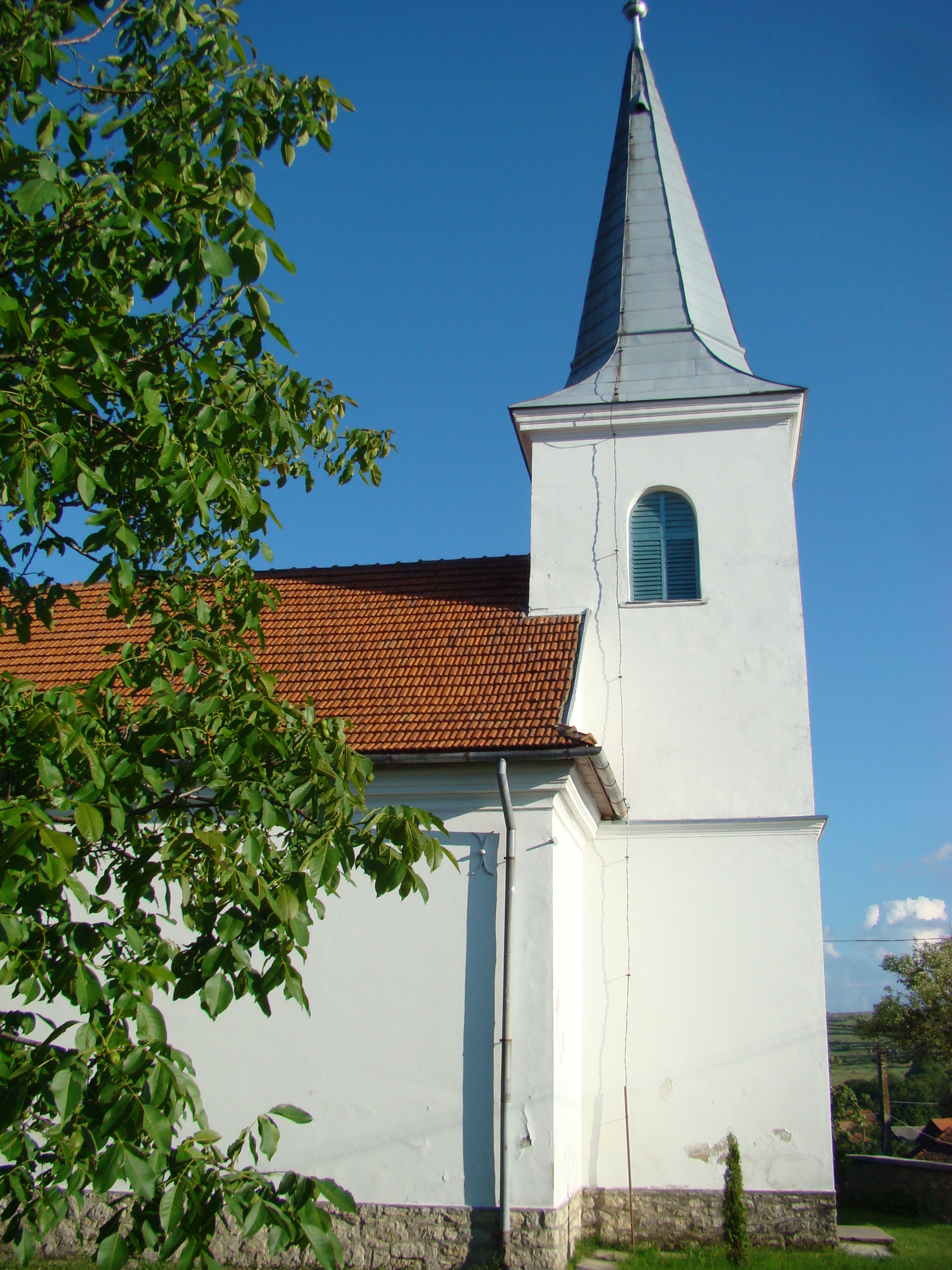 Biserica reformată, sat DUMBRAVA; comuna CĂPUŞU MARE, județul Cluj